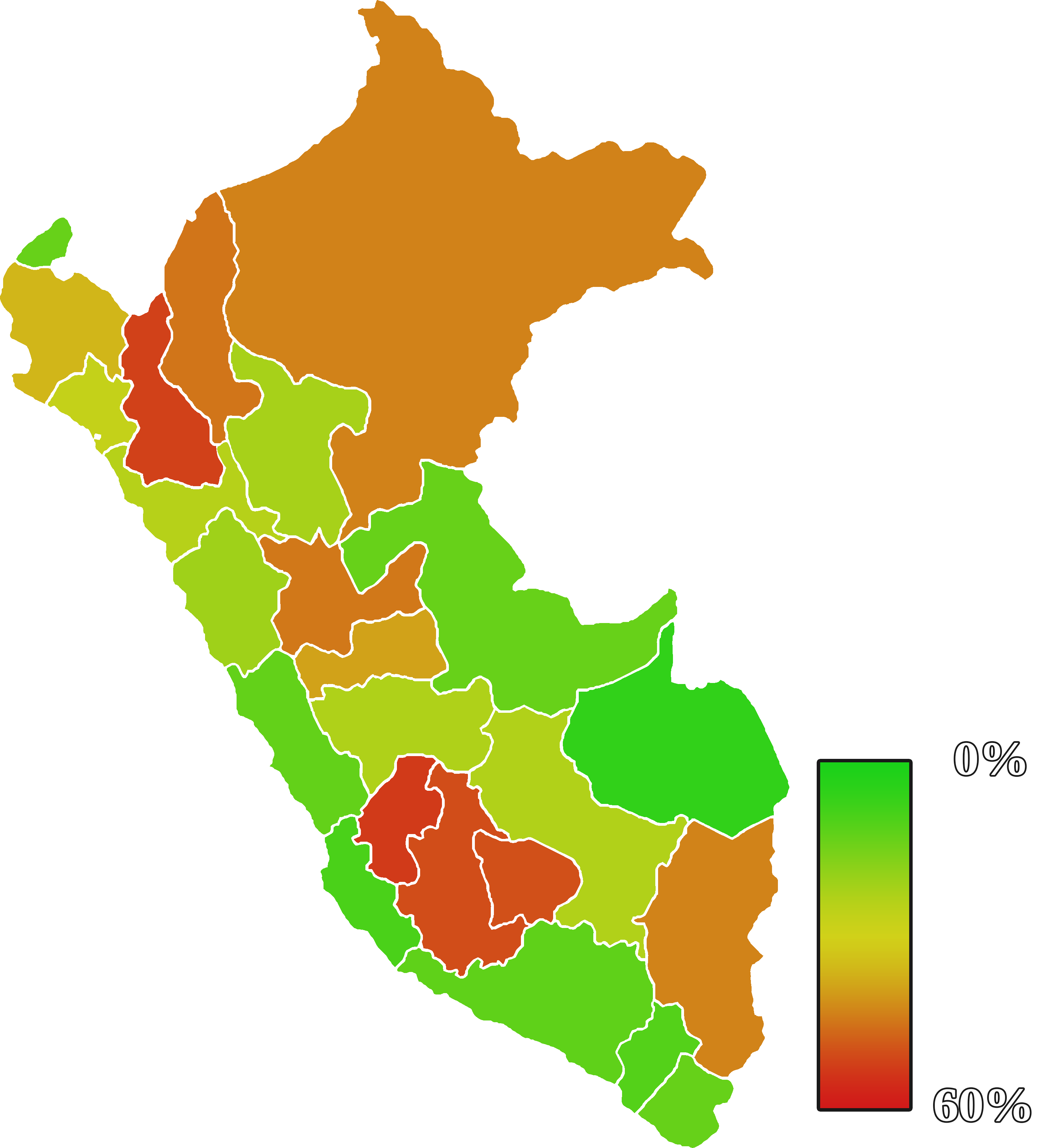 El color verde más intenso indica menos pobreza, mientras que el color rojo más intenso indica mayor pobreza.